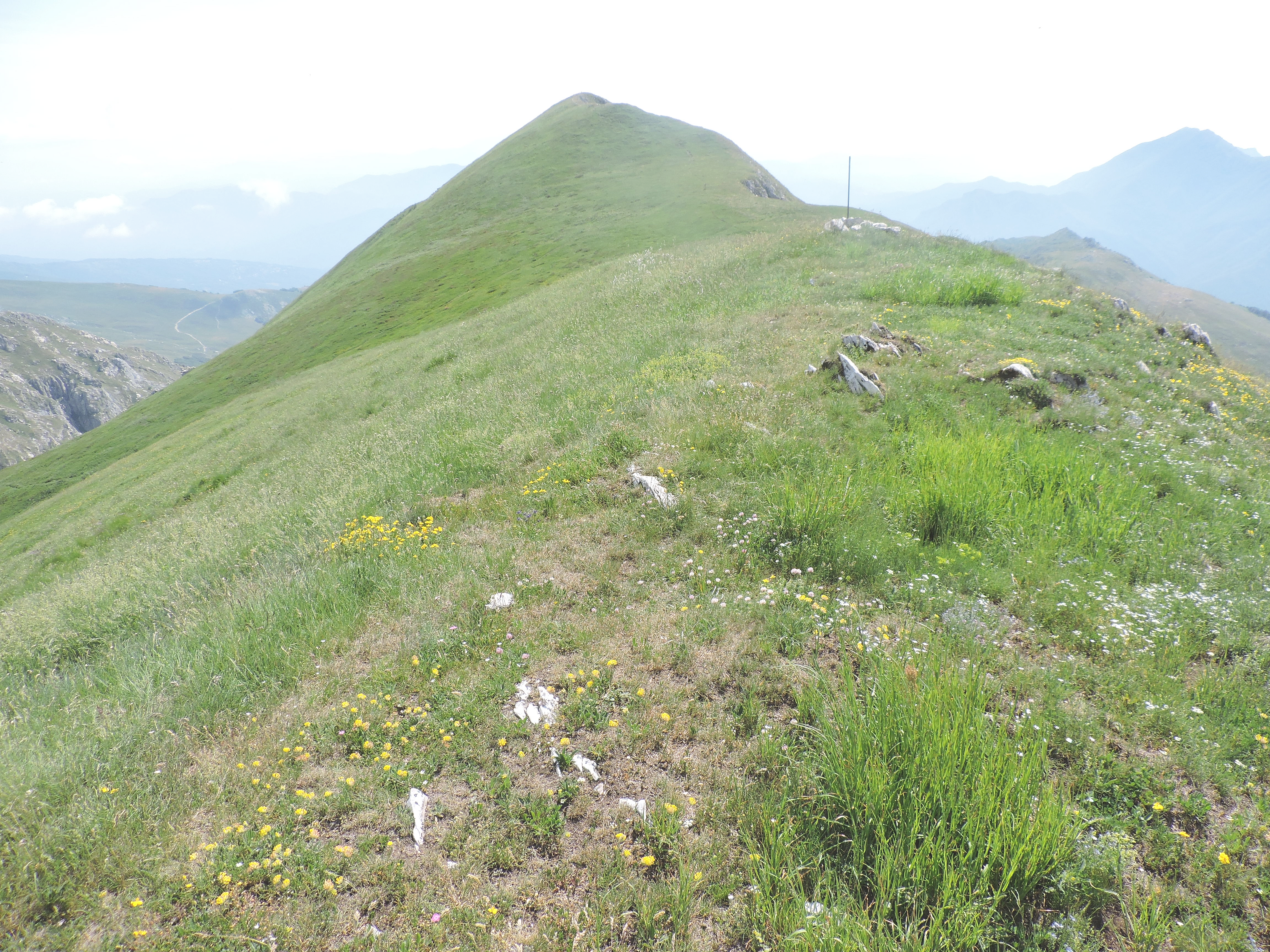 Il Monte Antoroto (Alpi Liguri) visto dall'anticima occidentale